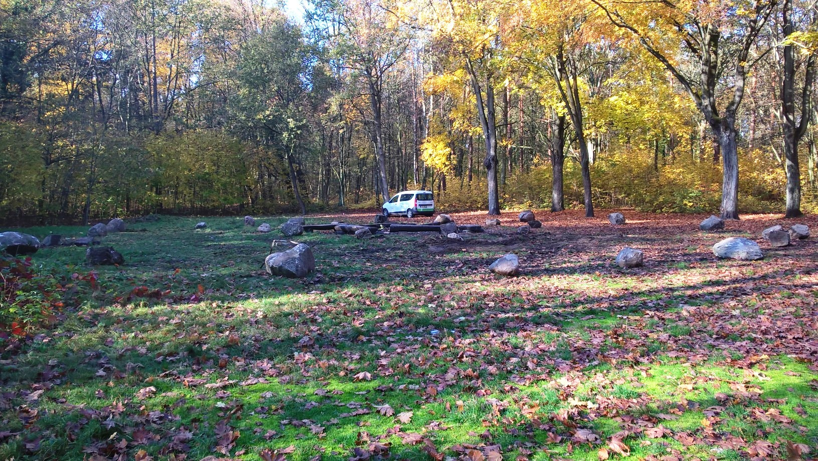 Szprotawa to poświadczone źródłowo miejsce zamieszkiwane we wczesnym średniowieczu przez plemię Dziadoszyców (Dziadoszan). W 1000 r. w obecnej dzielnicy miasta - Iławie (Ilva) książę polski Bolesław Chrobry witał i gościł cesarza niemieckiego Ottona III podążającego na Zjazd Gnieźnieński. Park Słowiański w Szprotawie i jego otoczenie jest obszarem ze stanowiskami archeologicznymi.